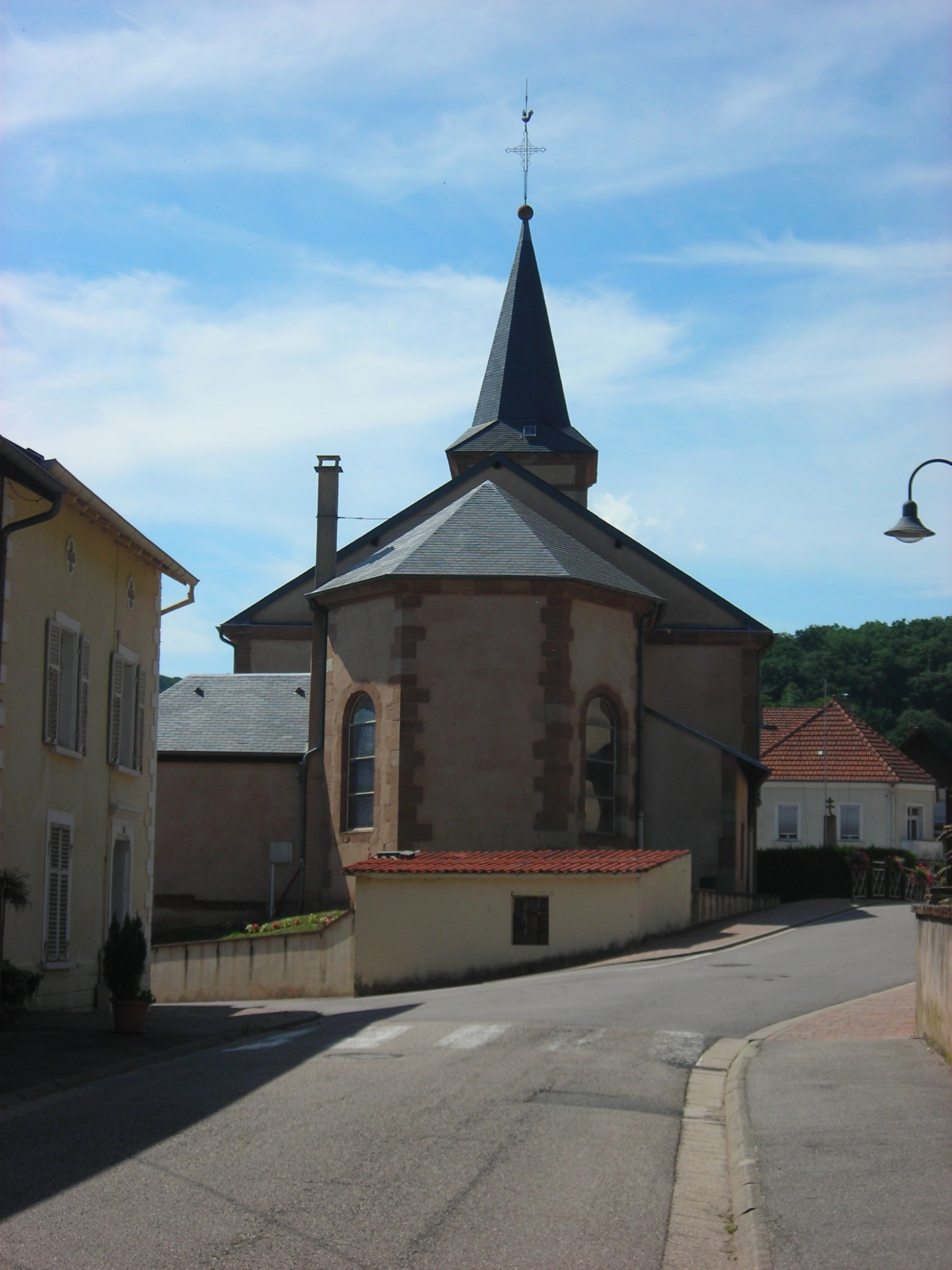 Chevet de l'église St. Jacques de Guerting (France)